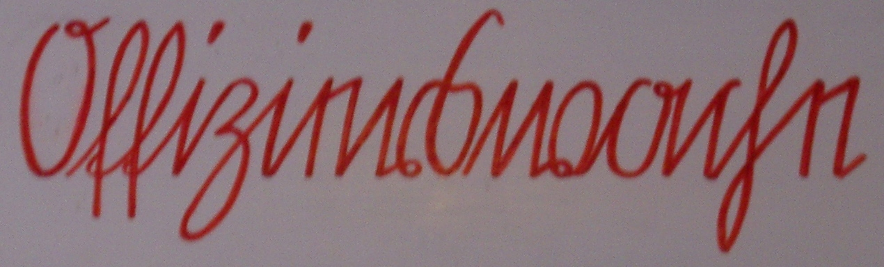 Sütterlin letters on a sign in Erfurt, Fortress Petersberg, "Offizierswache" "Officers' guard room"